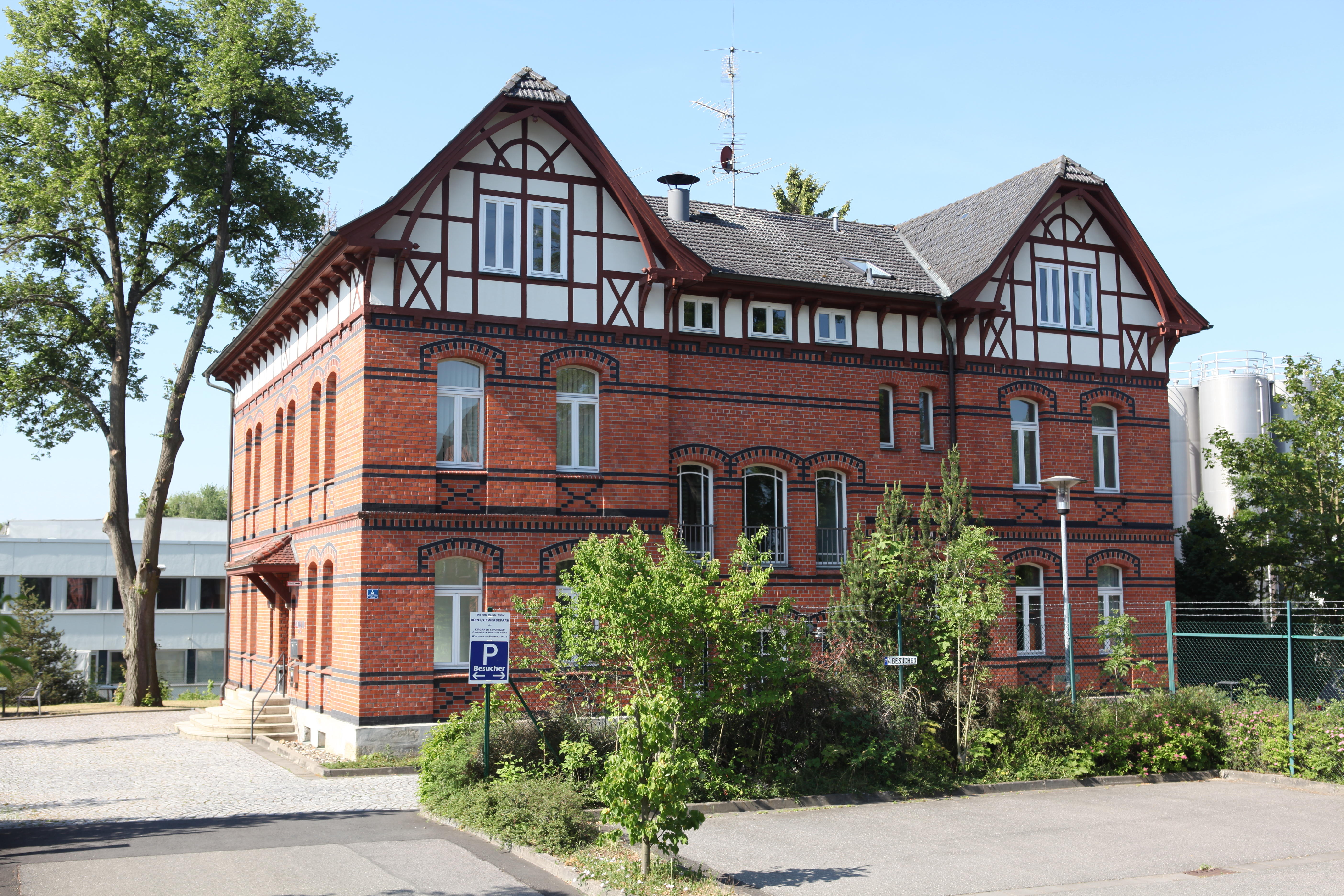 Bad Rodach, Landkreis Coburg, Werner-von-Siemens-Straße, Roesler-Villa